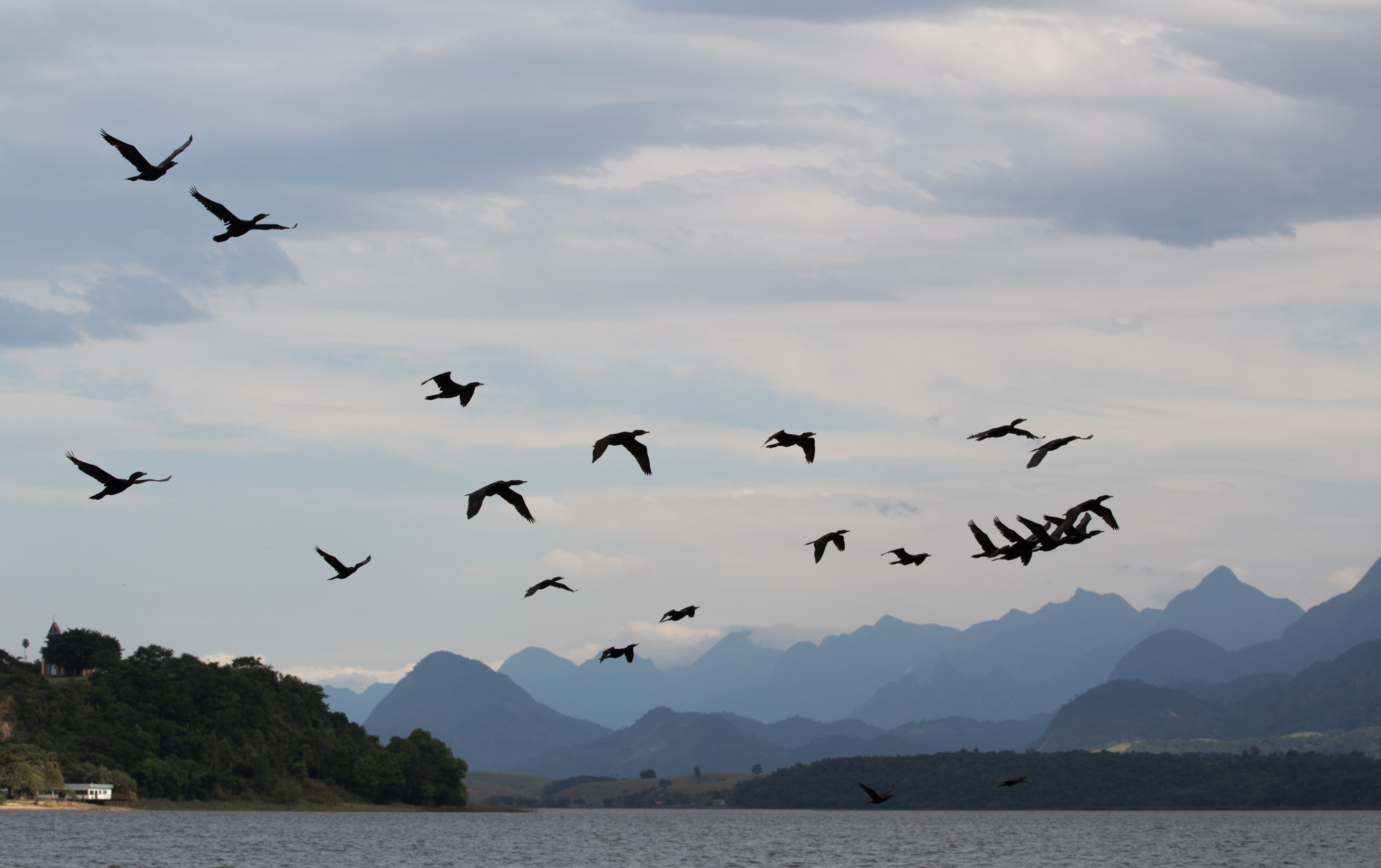 Destaque para o bando de Biguá e ao Desengano no fundo. O biguá é uma ave bastante predominante na Lagoa de Cima, entorno do Parque.